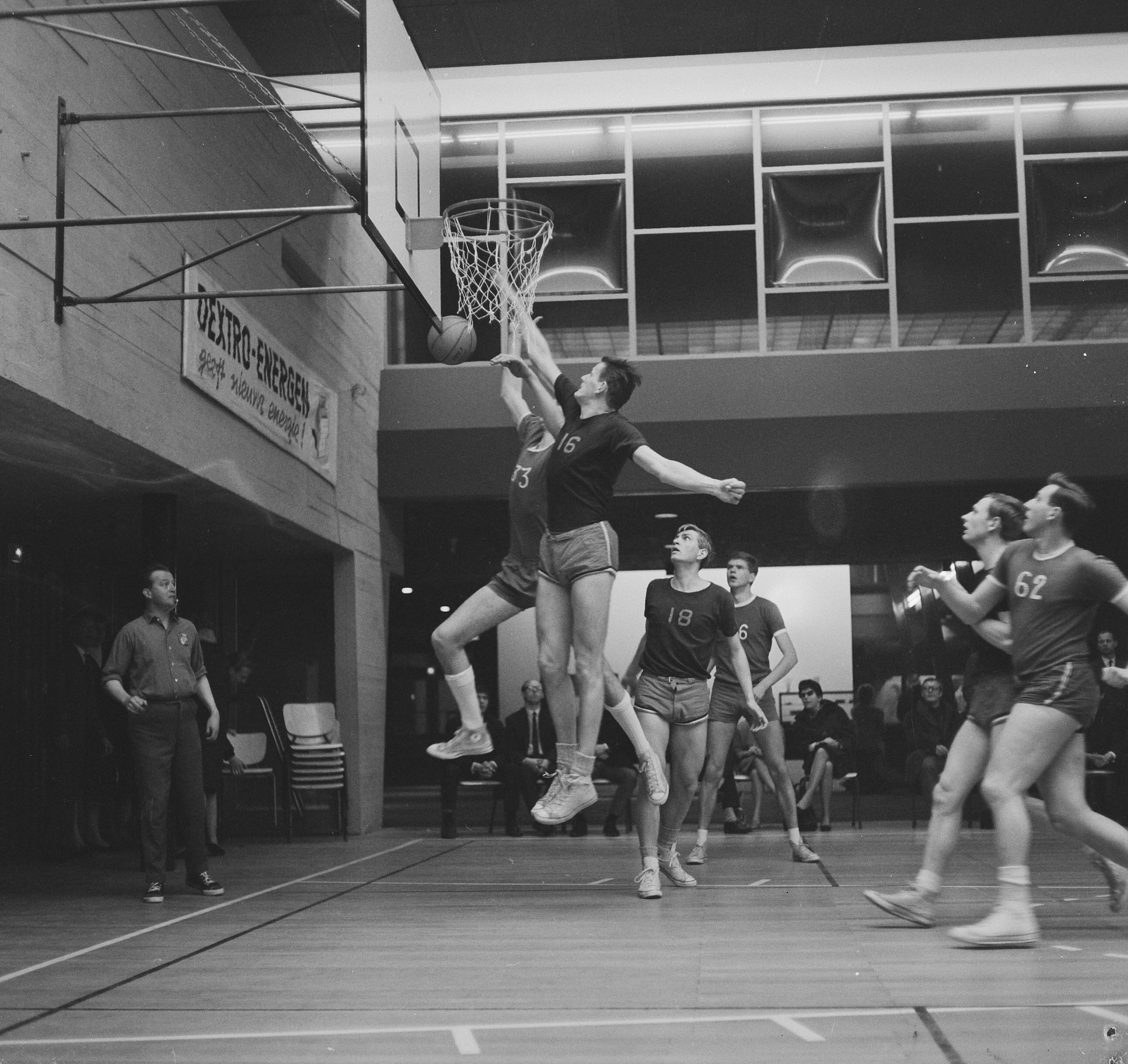 Collectie / Archief : Fotocollectie Anefo Reportage / Serie : [ onbekend ] Beschrijving : Basketbal Landlust tegen Herly 52-62, Freek Witte (nr. van Landlust tracht te scoren Datum : 21 maart 1965 Trefwoorden : BASKETBAL Fotograaf : Kroon, Ron / Anefo Auteursrechthebbende : Nationaal Archief Materiaalsoort : Negatief (zwart/wit) Nummer archiefinventaris : bekijk toegang 2.24.01.03 Bestanddeelnummer : 917-5626